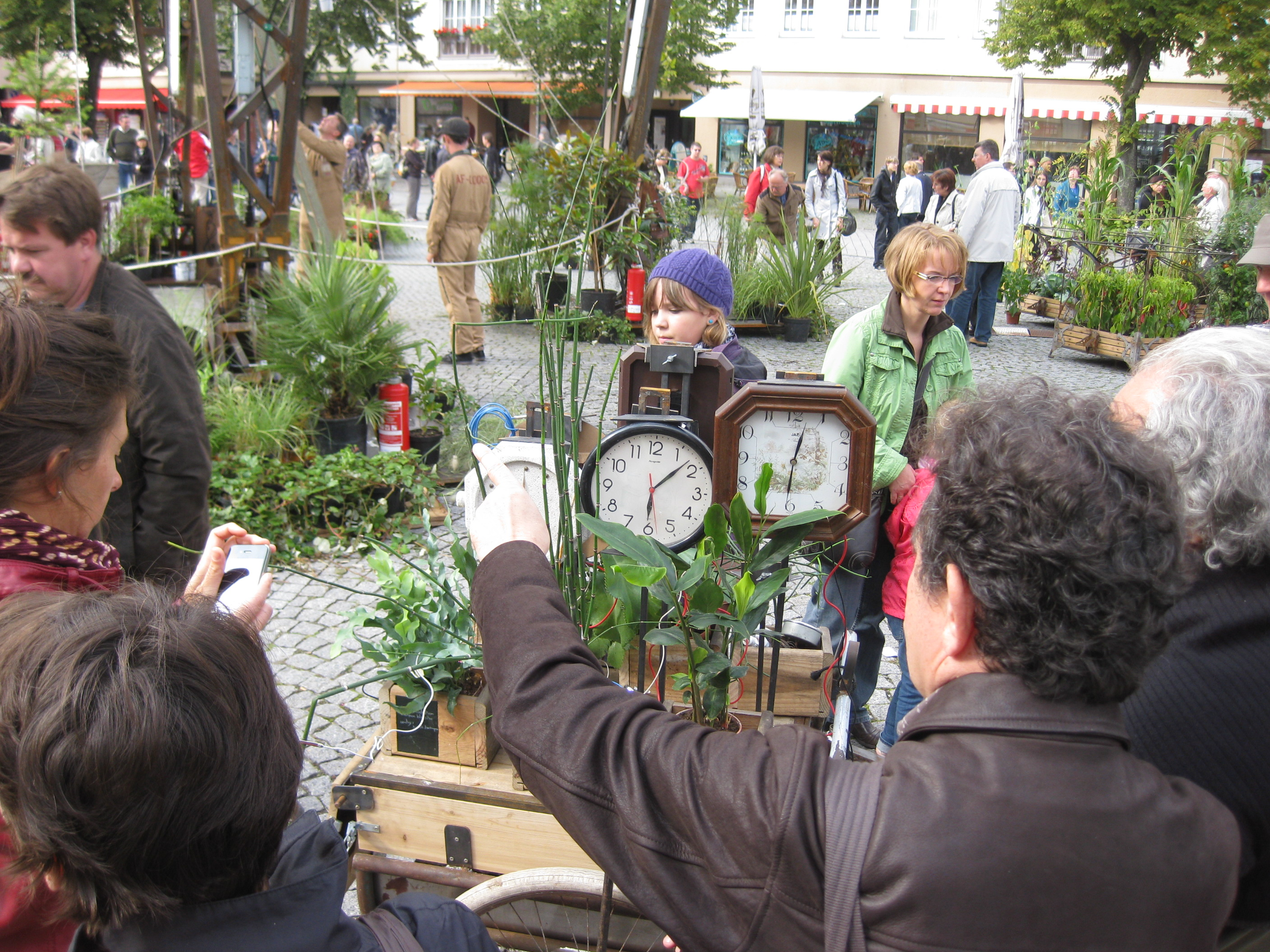 Théâtre infusé: Strassentheater èxpedition végétale, interaktives Spekatel auf dem Rathausplatz Dessau